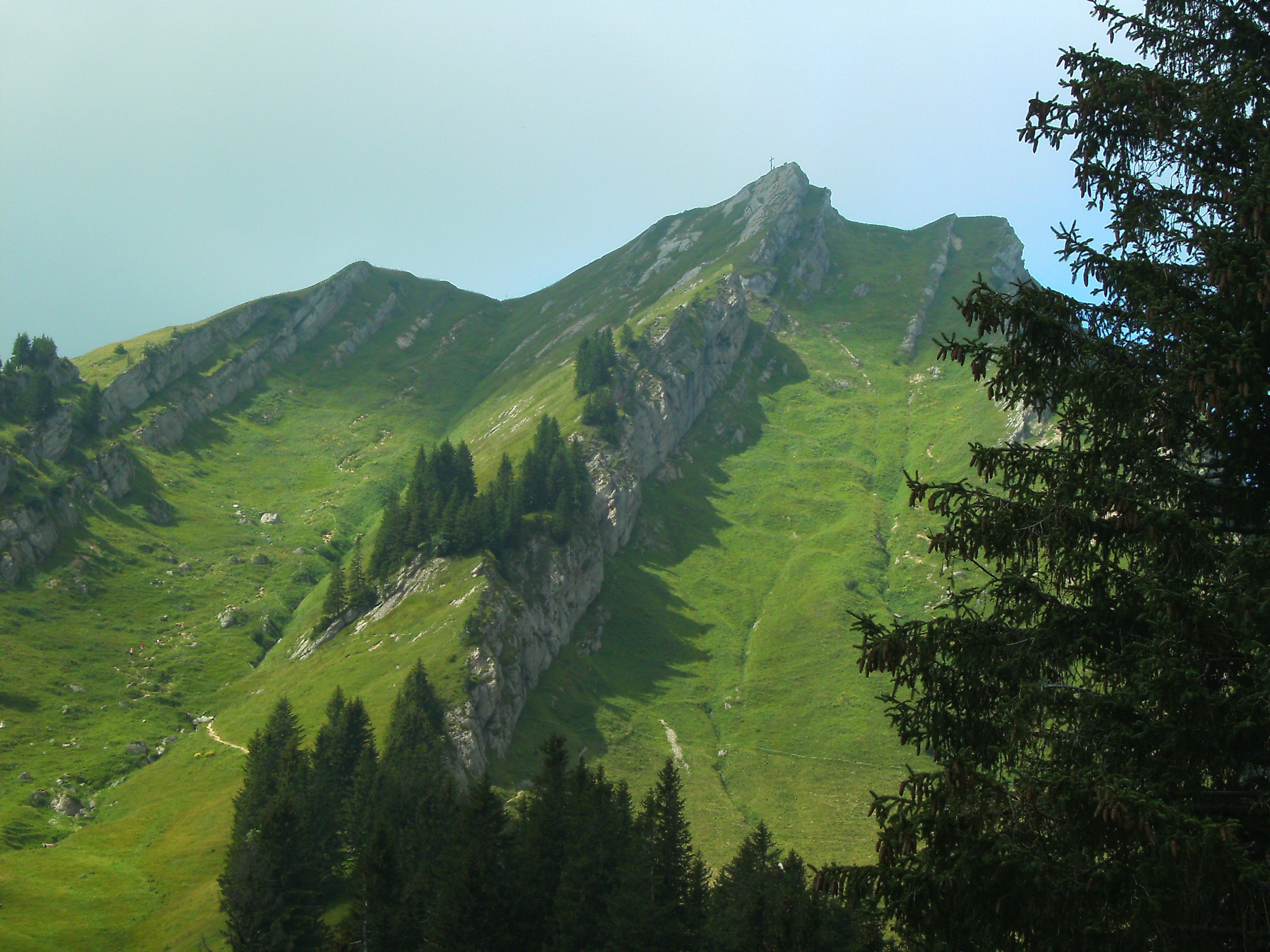 Rindalphorn vom Standort Gündlesscharte